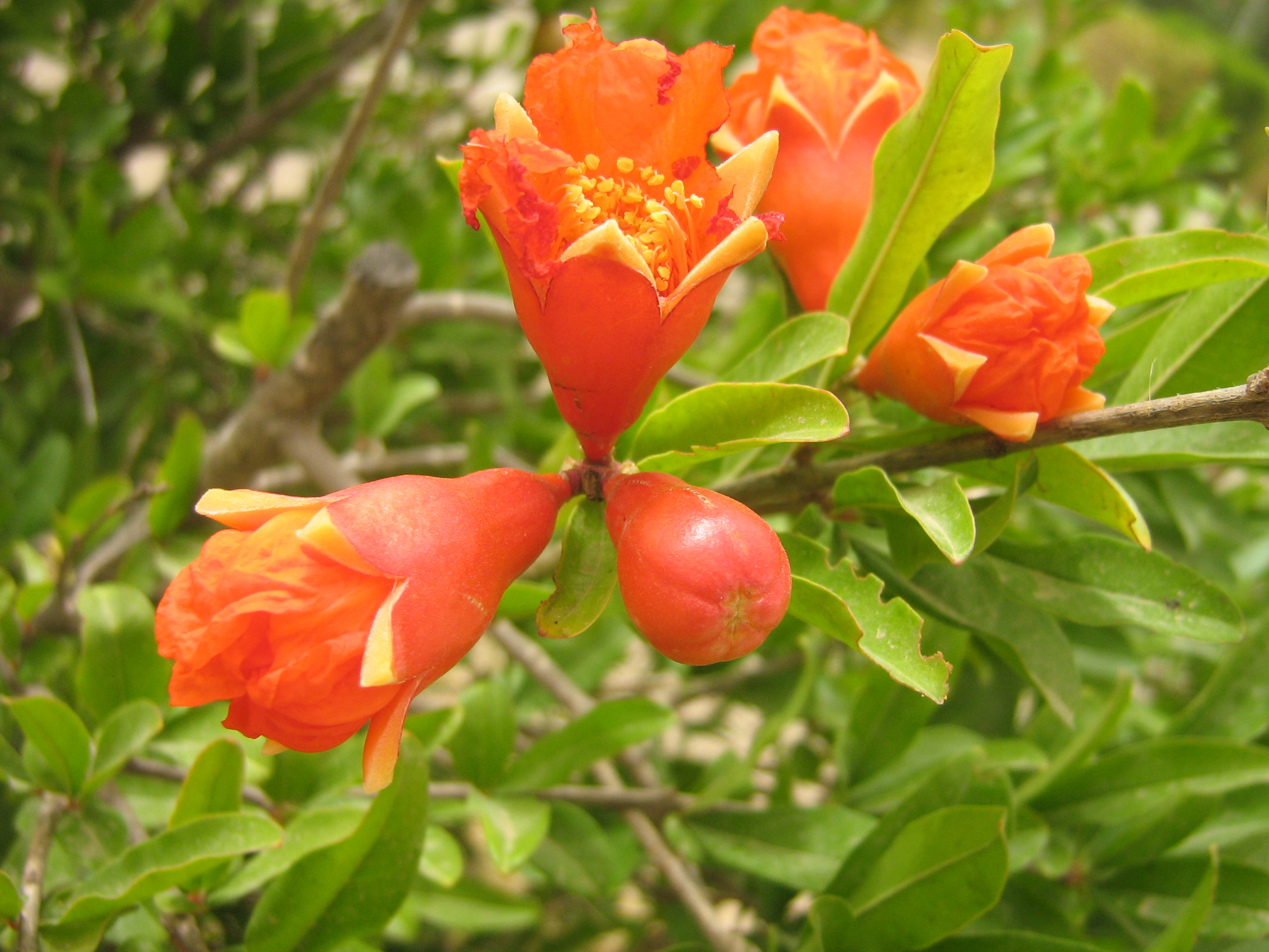 Цветущий гранат в Бенгашире, Ливия.